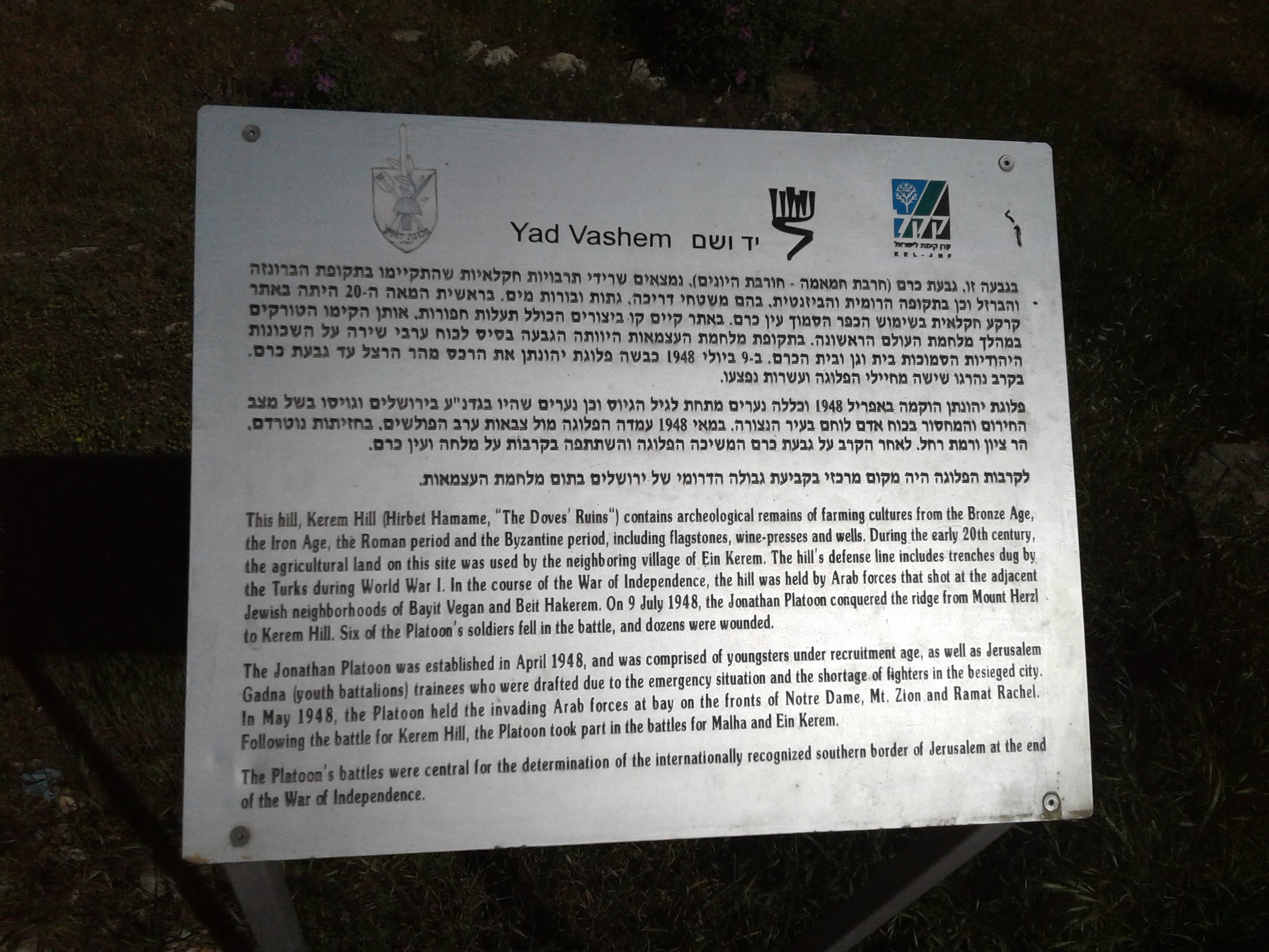 שלט הנצחה לפלוגת יהונתן ביער ירושלים, באתר הקרב על חרבת חמאמה (גבעת כרם)